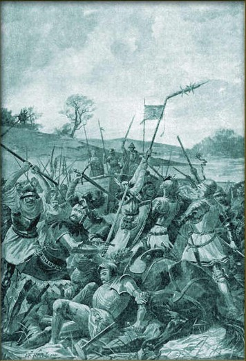 Ferdinand Hetteš (1864–1927) – Porážka železných pánů u Sudoměře dne 25. března 1420